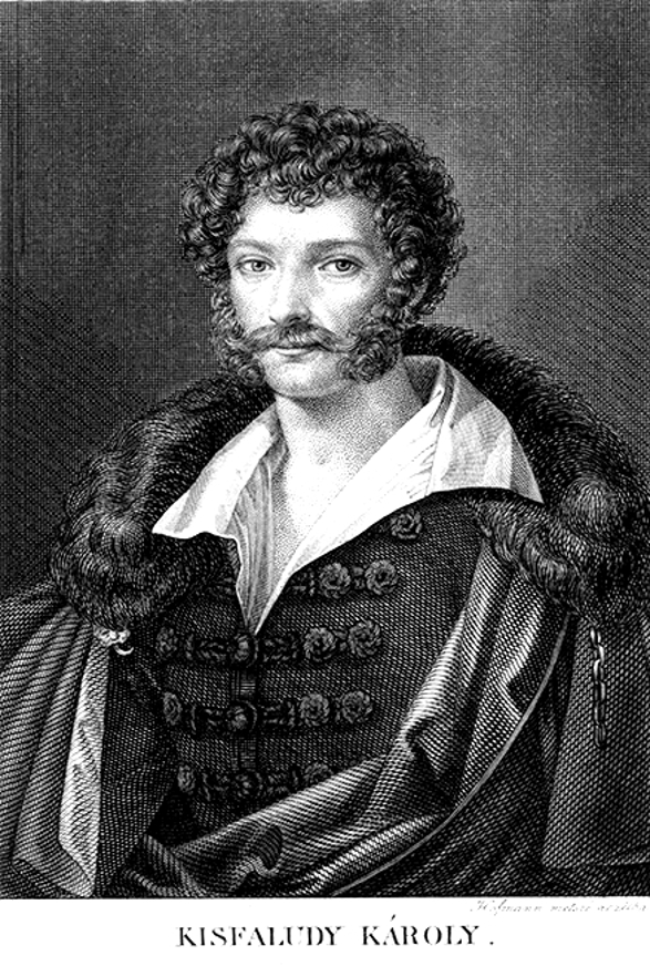 Kisfaludy Károly (Tét, 1788. február 5. – Pest, 1830. november 21.) költő, drámaíró, festő.